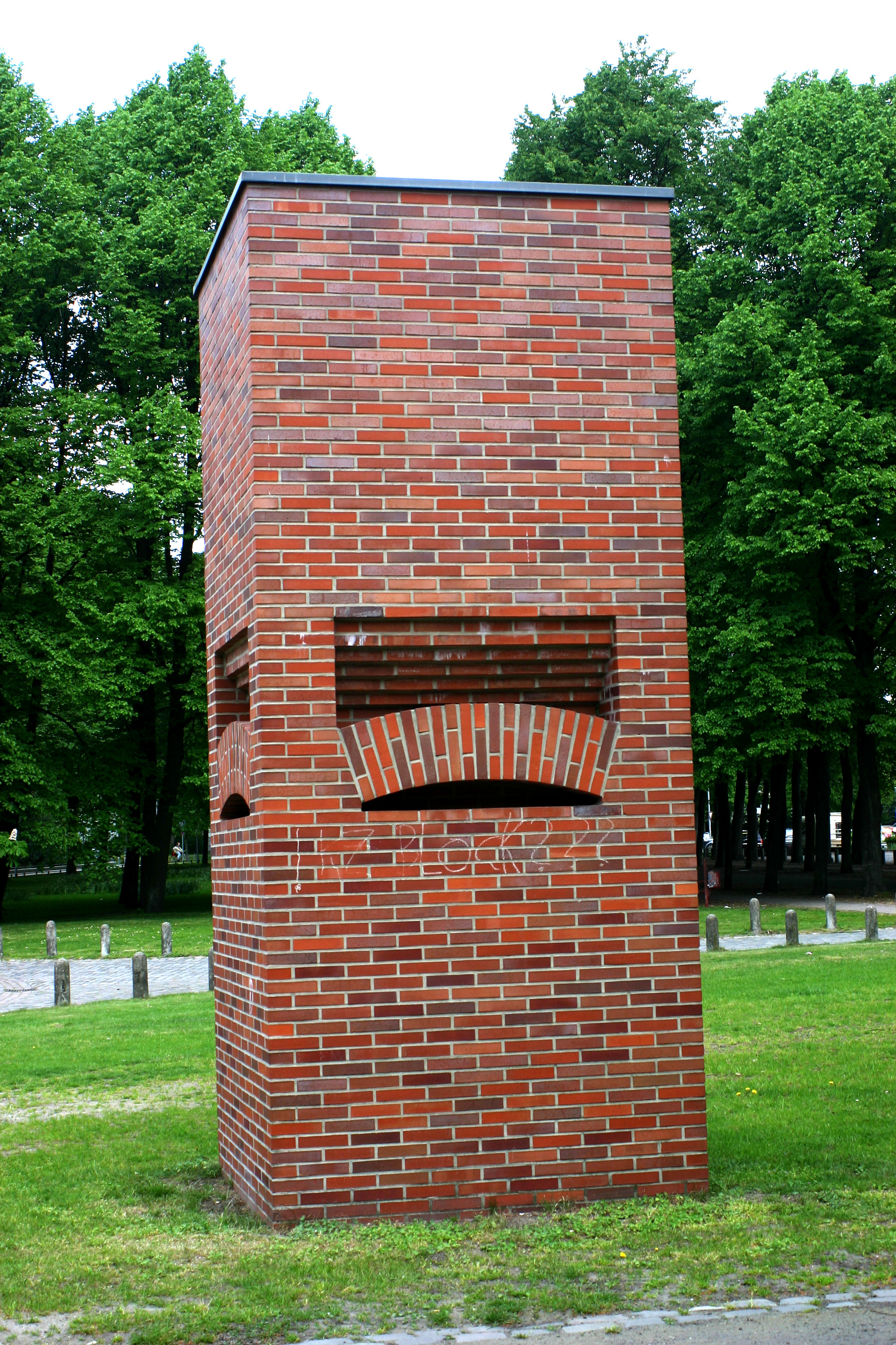 Per Kirkeby: Backstein-Skulptur (1986) auf dem Schlossplatz in Münster am Zoologischen Institut